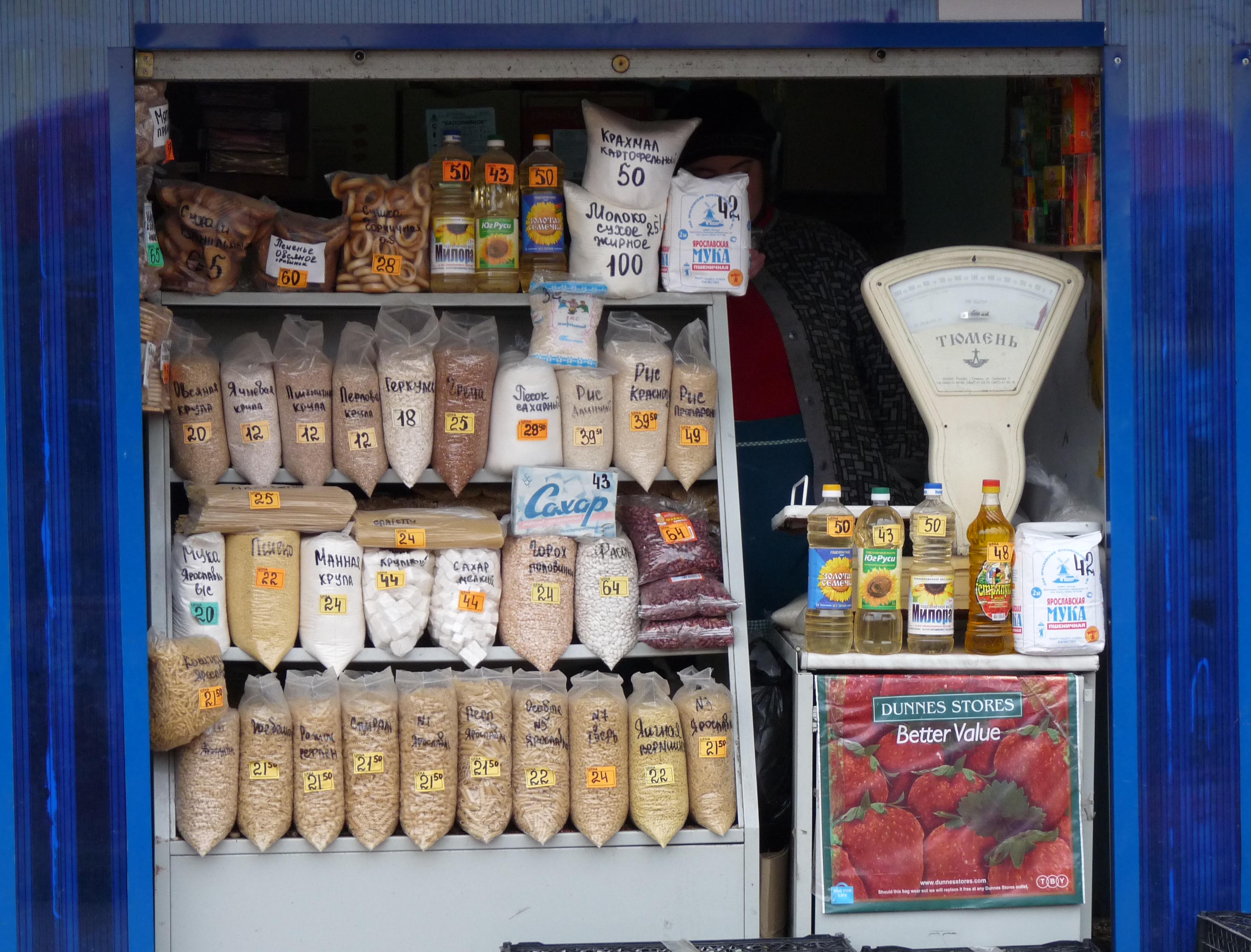 Kostroma Market 07 Dunn's Stores